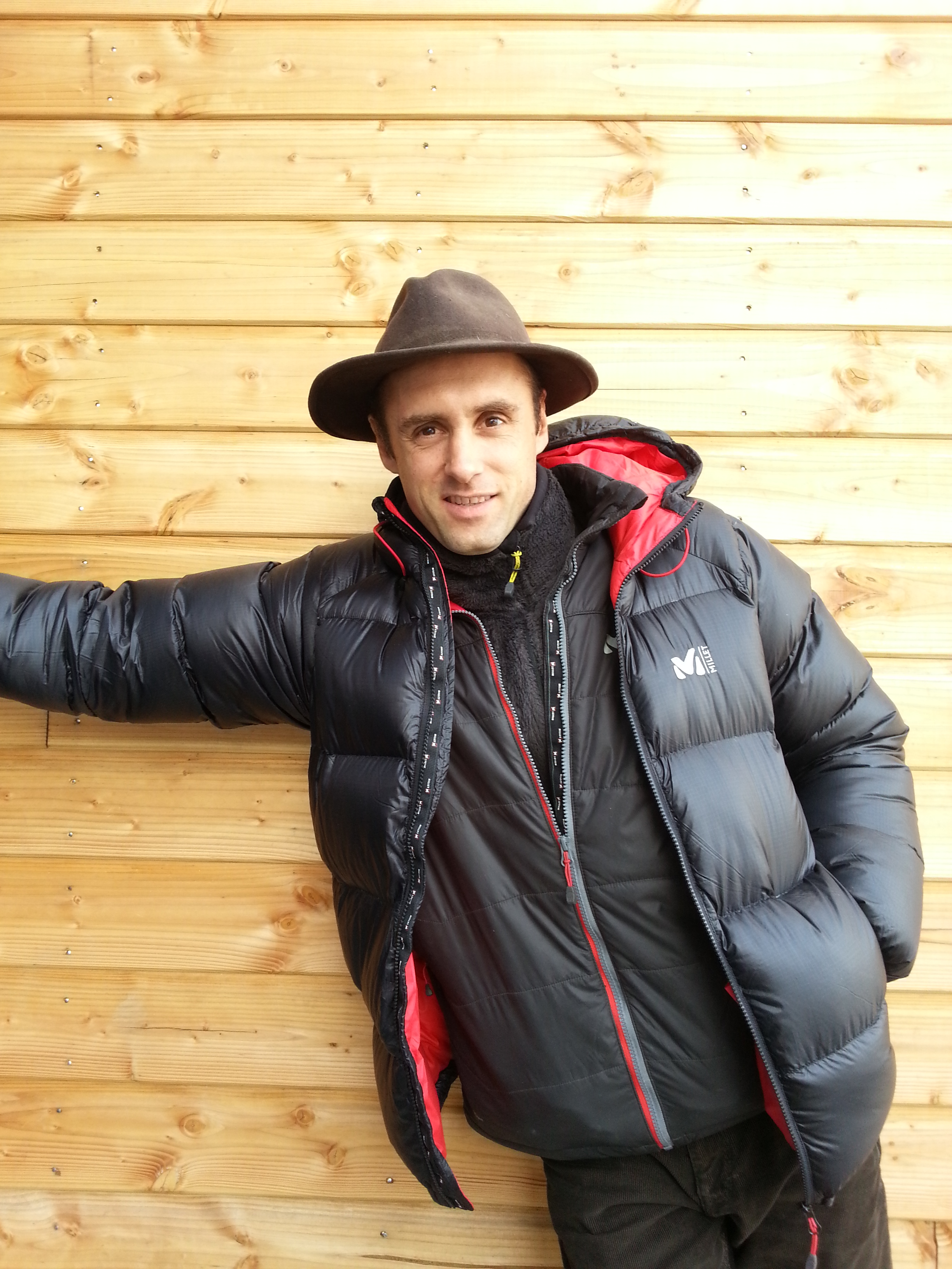 Daniel Du Lac en mars 2013 à Belcaire